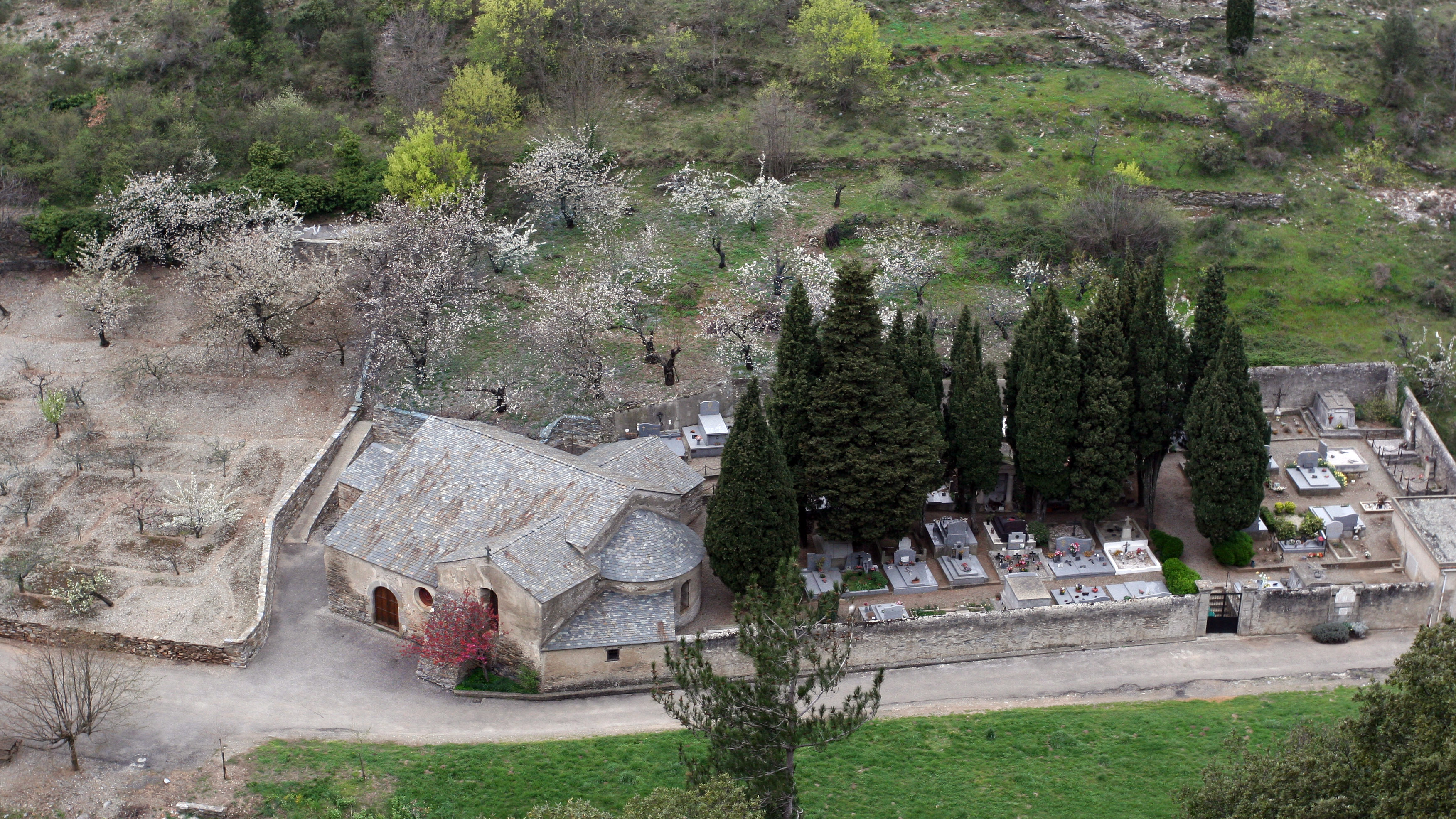 Vue de la route